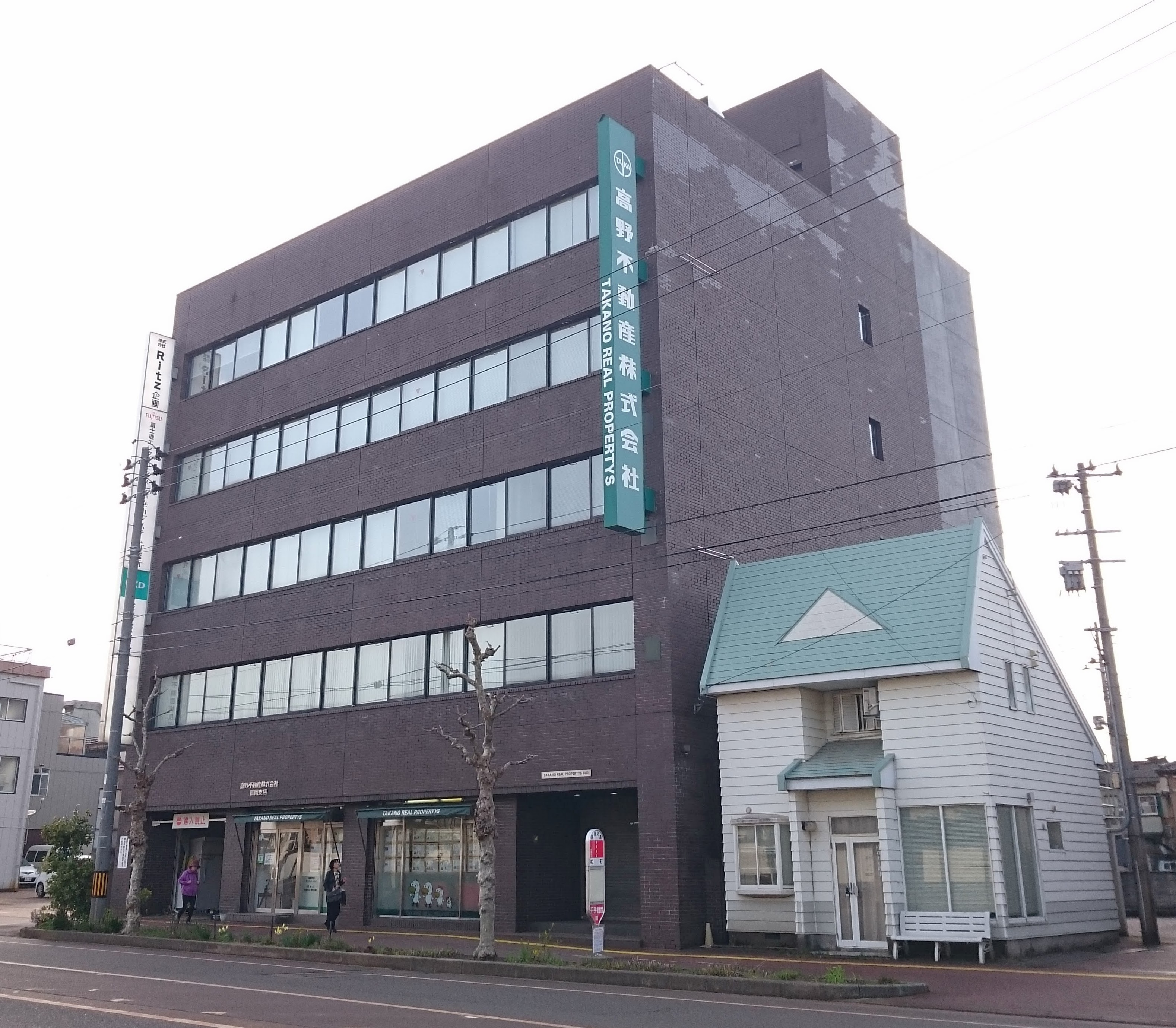 高野不動産の本社外観